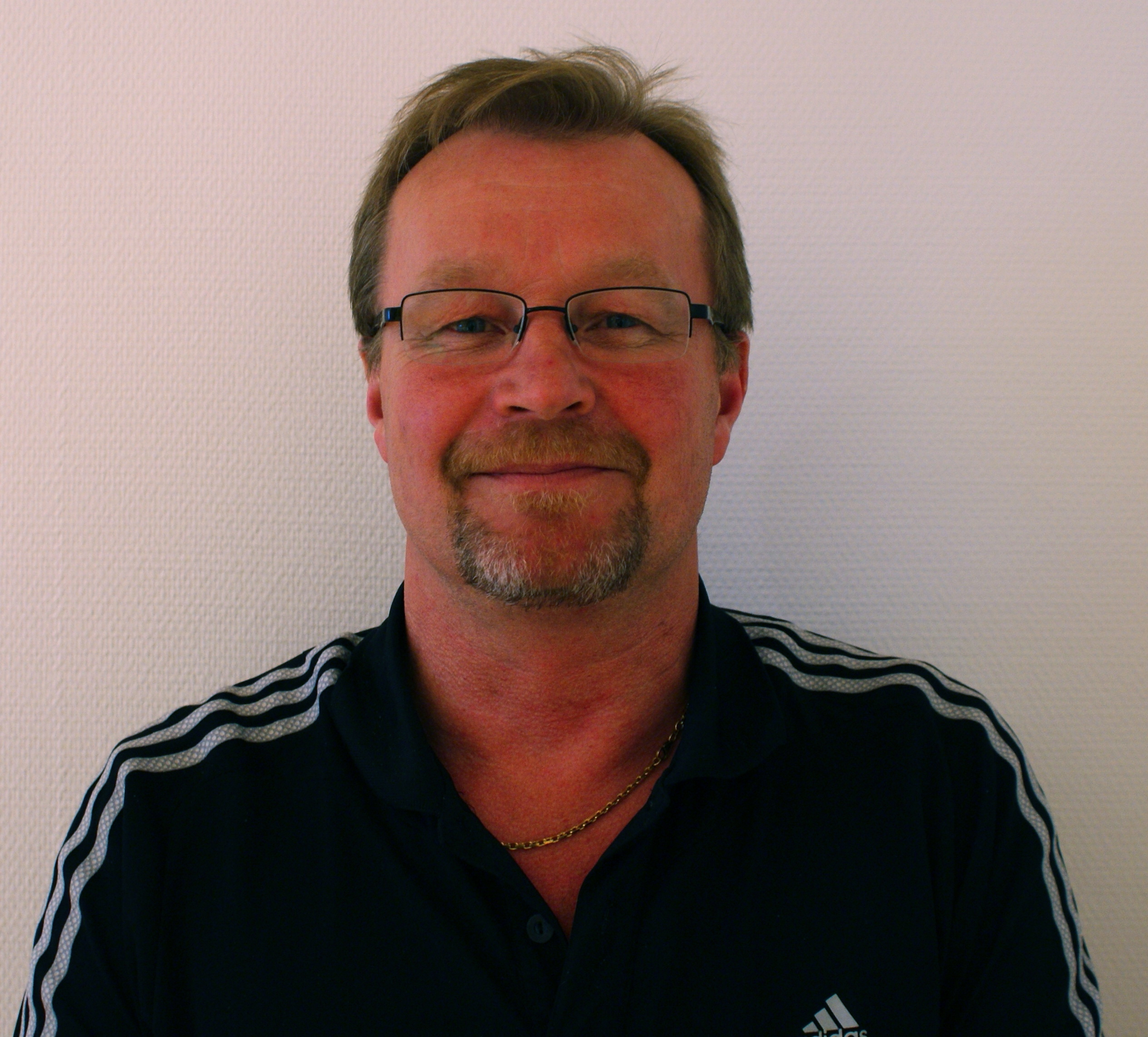 Sigmund Steinnes(1959), ordfører for AP i Storfjord fra 2011